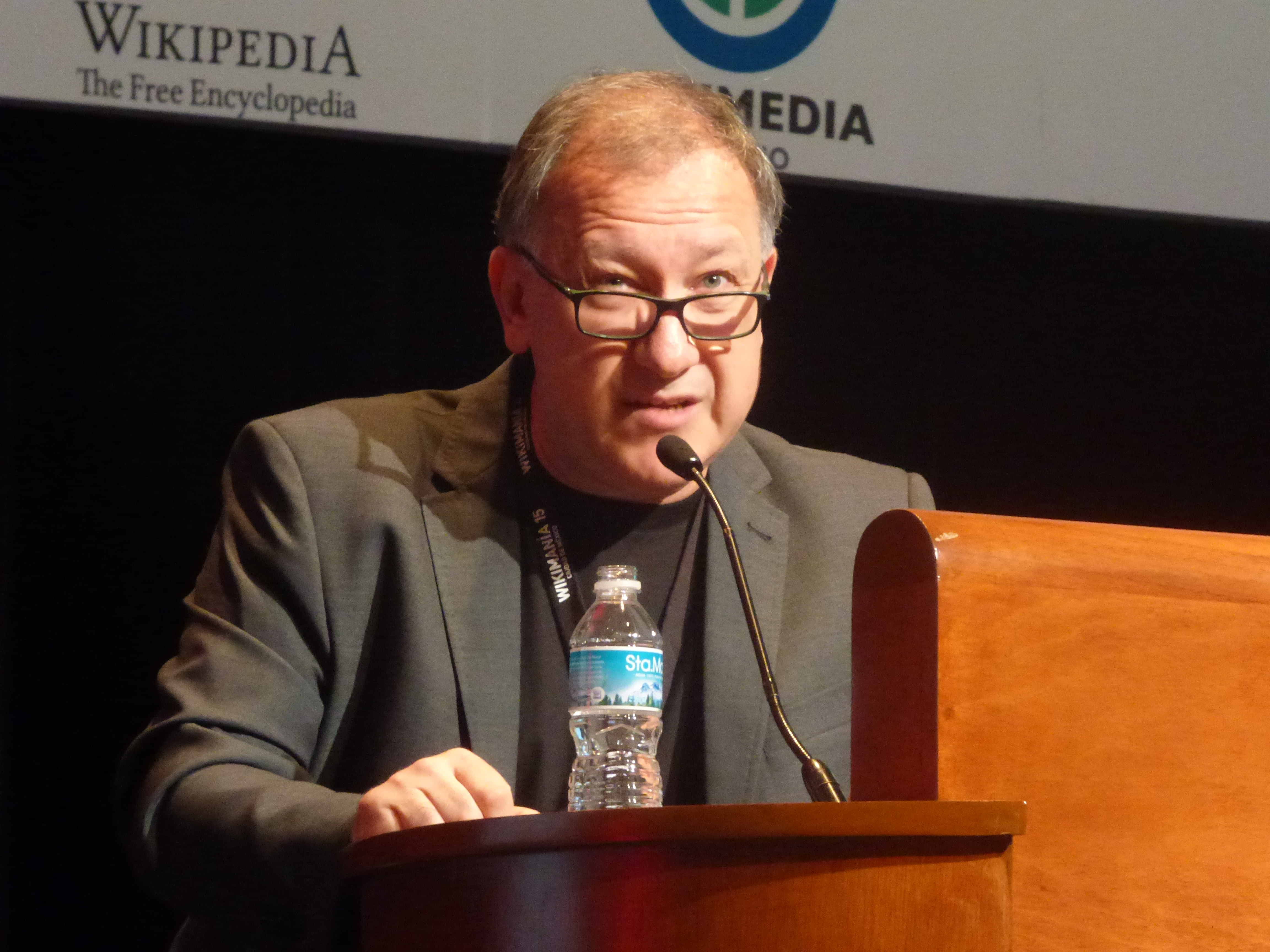 Carlos A. Scolari en Wikimania 2015, dando una ponencia sobre Wikipedia y la evolución de los medios digitales